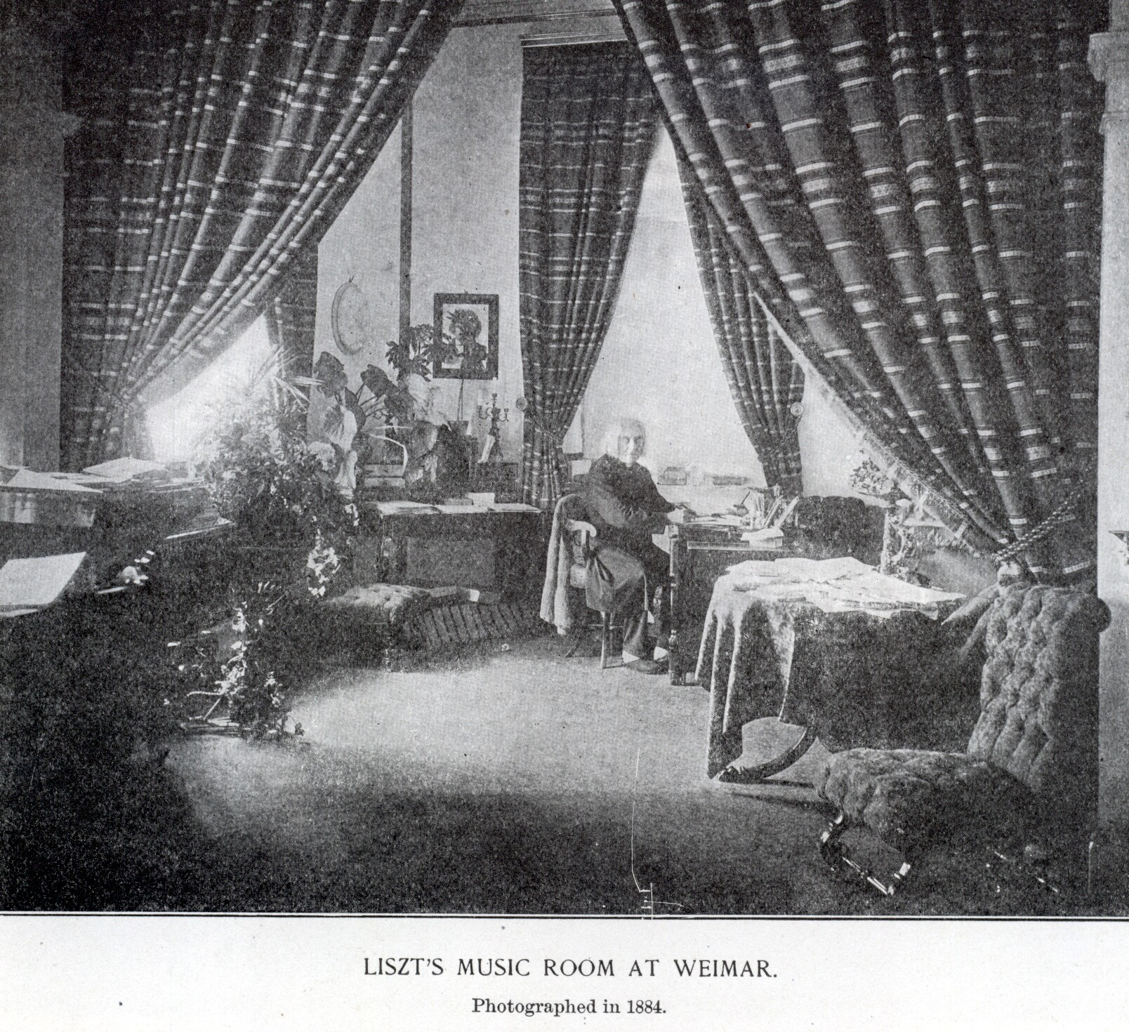 Franz Liszt (1811–1886)